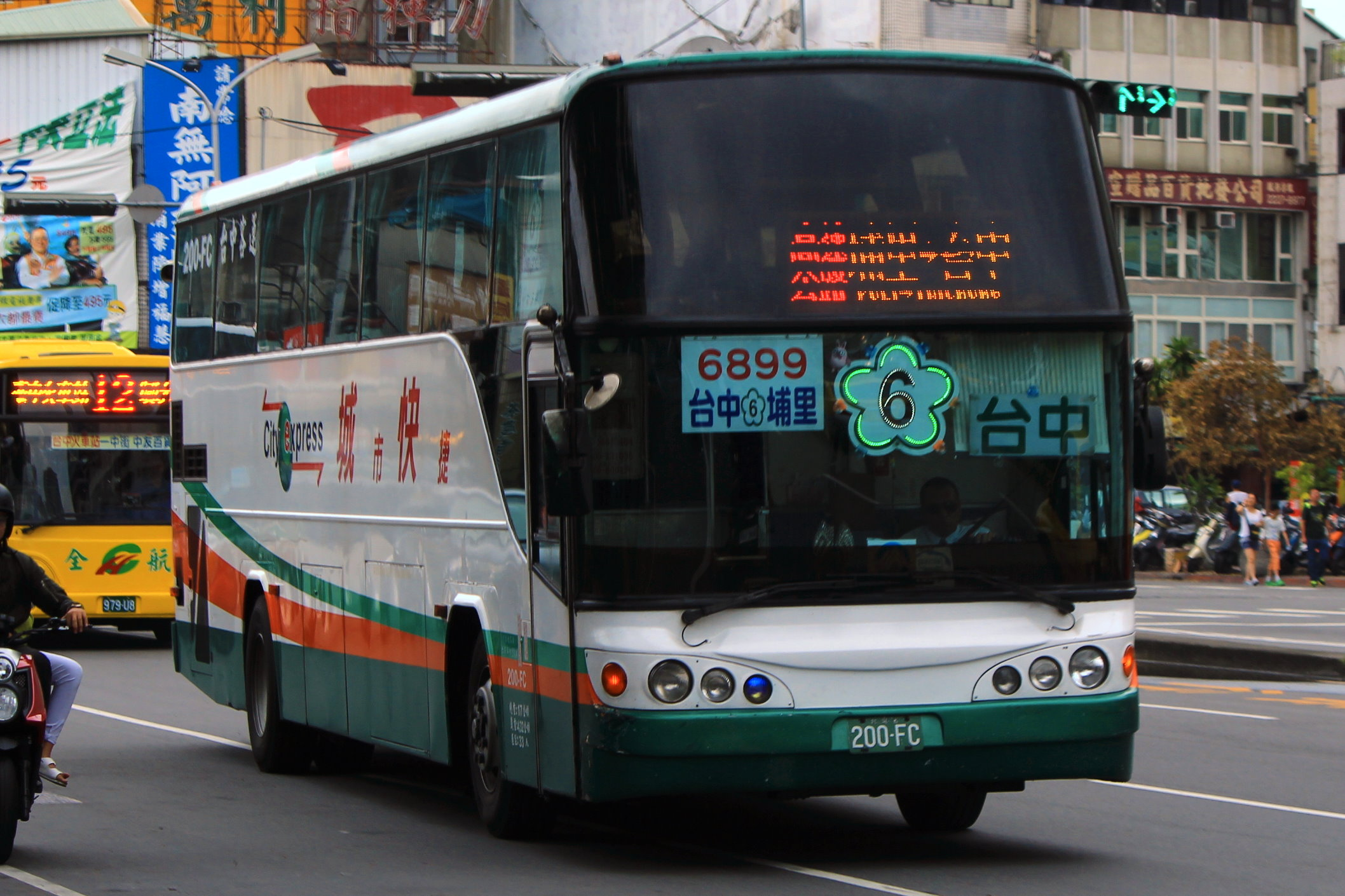 中文（台灣）: 城市快捷~